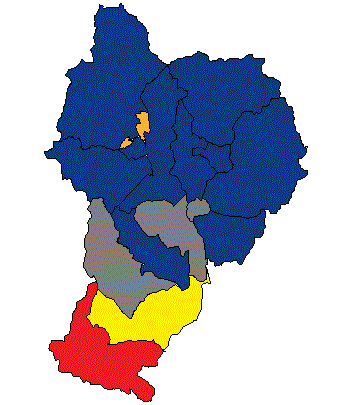 !Template:Llegenda}